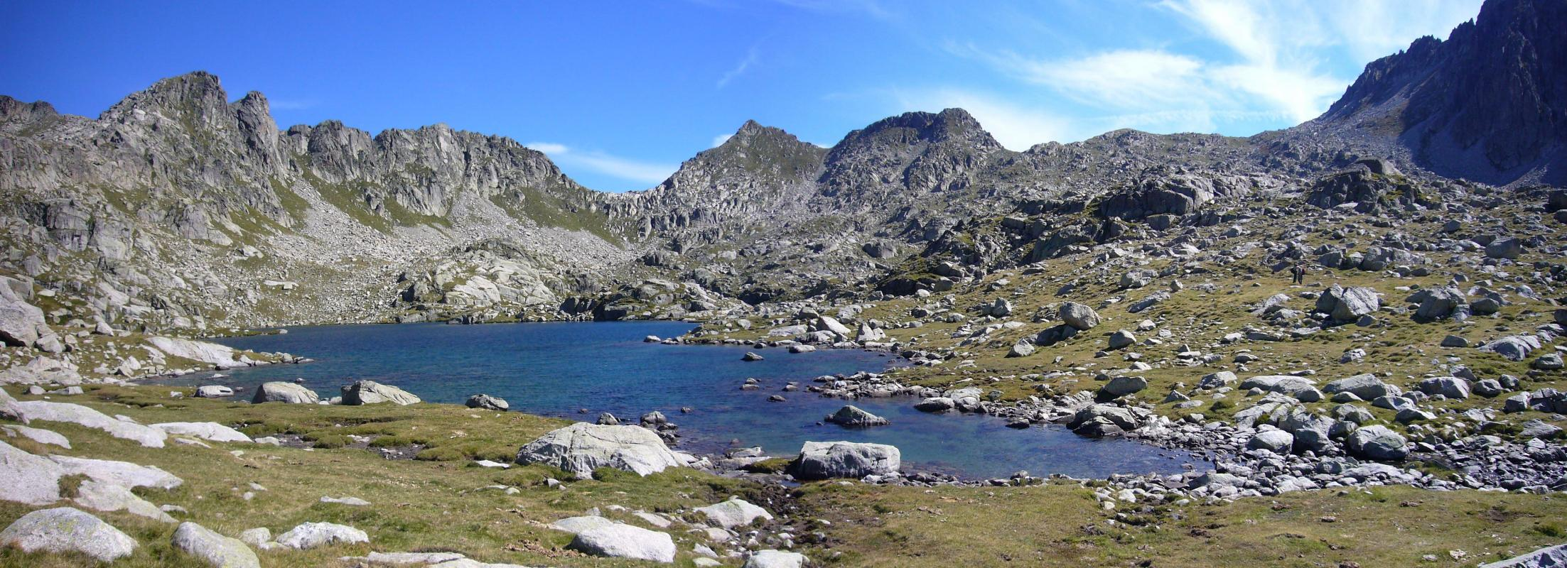 Estany de Mangades, vist des del sud; la Vall de Boí, Alta Ribagorça, Catalunya